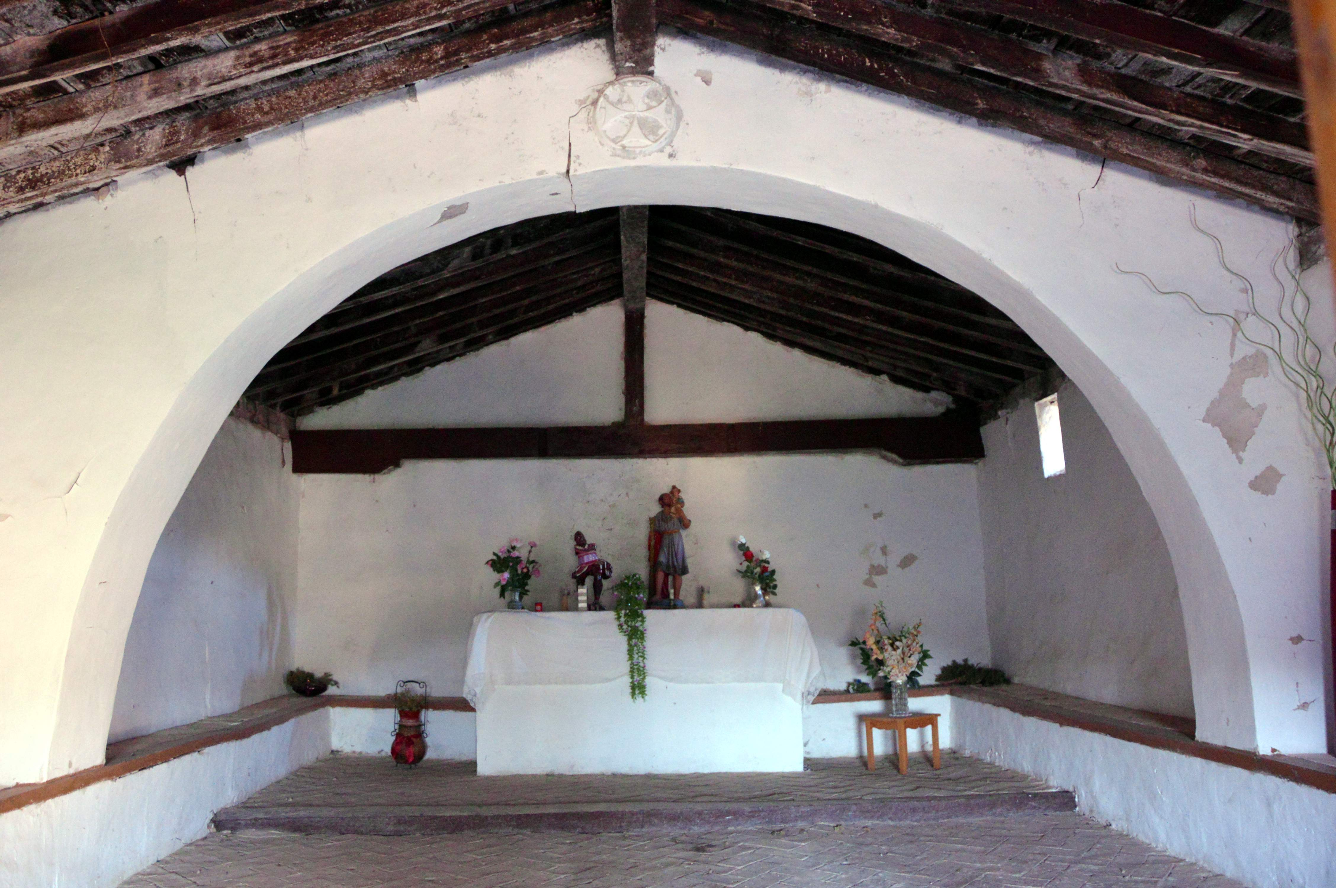 Vista parcial interior de la Ermita de San Cristóbal en Tormón (Teruel), con detalle del arco de diafragma y el presbiterio al fondo (2017).